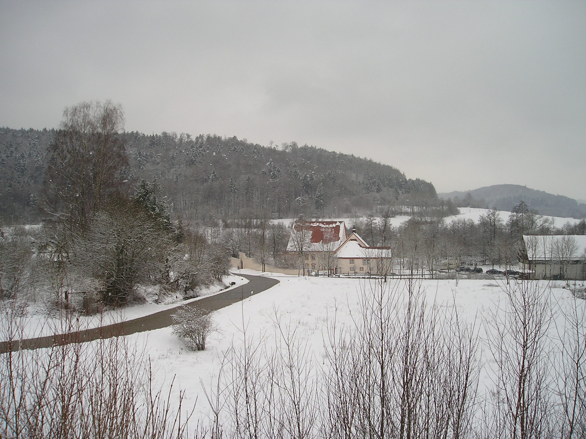 Gößelthalmühle, Ortsteil von Beilngries im Landkreis Eichstätt